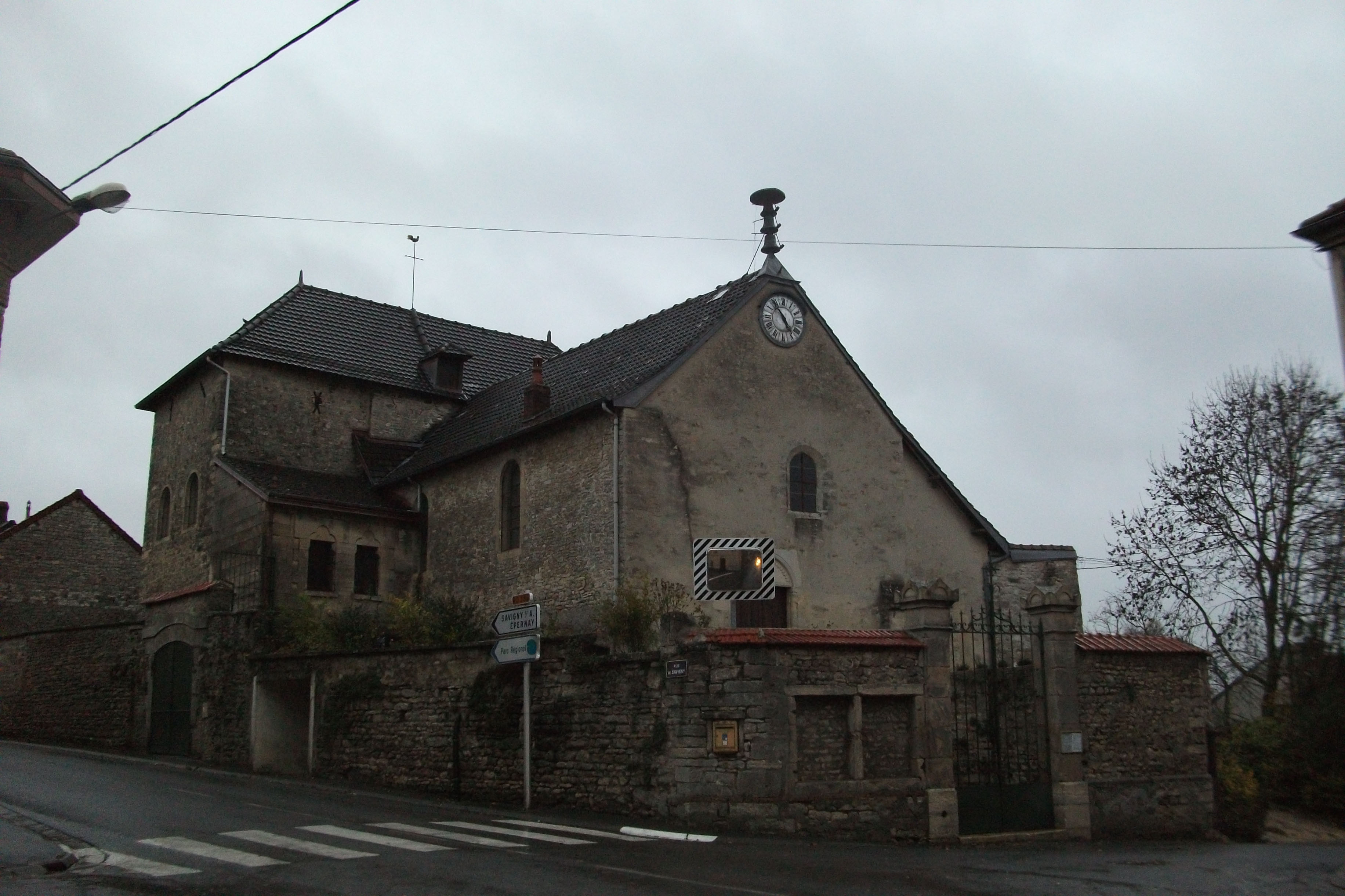 l'église de Serzy_et_Prin, avec son carillon en exterrieur.